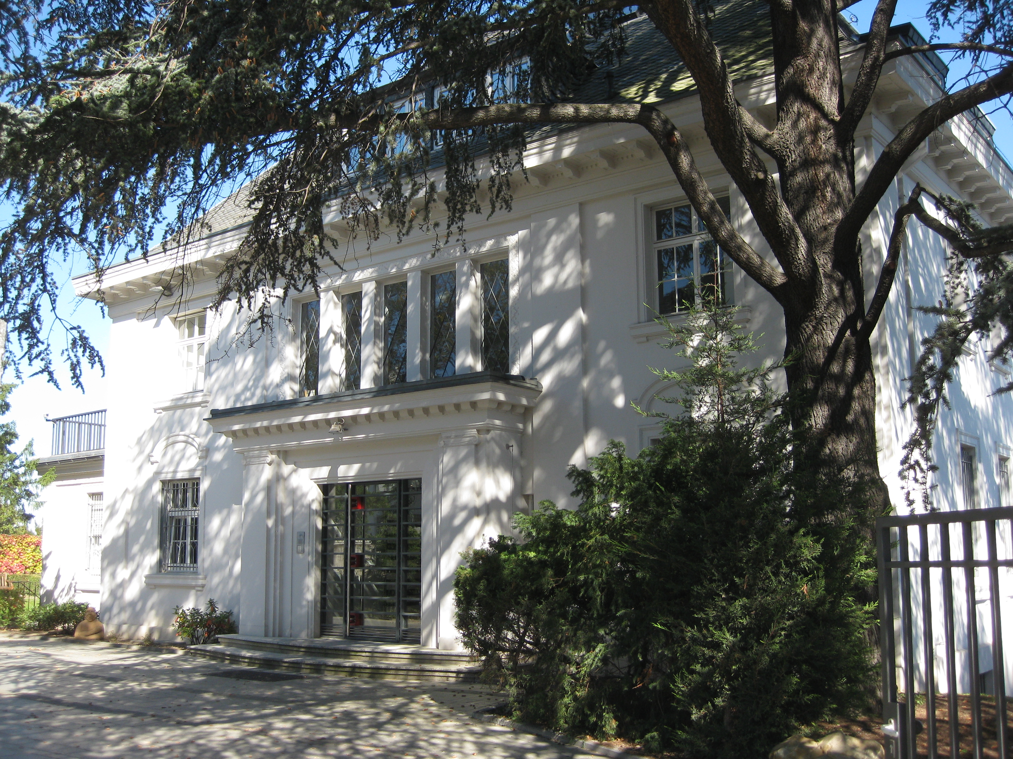 Deutschland, Bonn-Südstadt, Schaumburg-Lippe-Straße 9: Gebäude der ehemaligen Vertretung der Hansestadt Bremen beim Bund; Blick von der Schaumburg-Lippe-Straße. Nutzung zum Zeitpunkt der Aufnahme: Institut zur Zukunft der Arbeit.